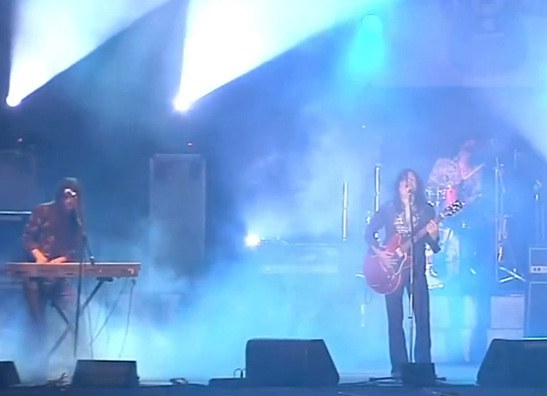 Banda nacional Amen en el Acustirock II